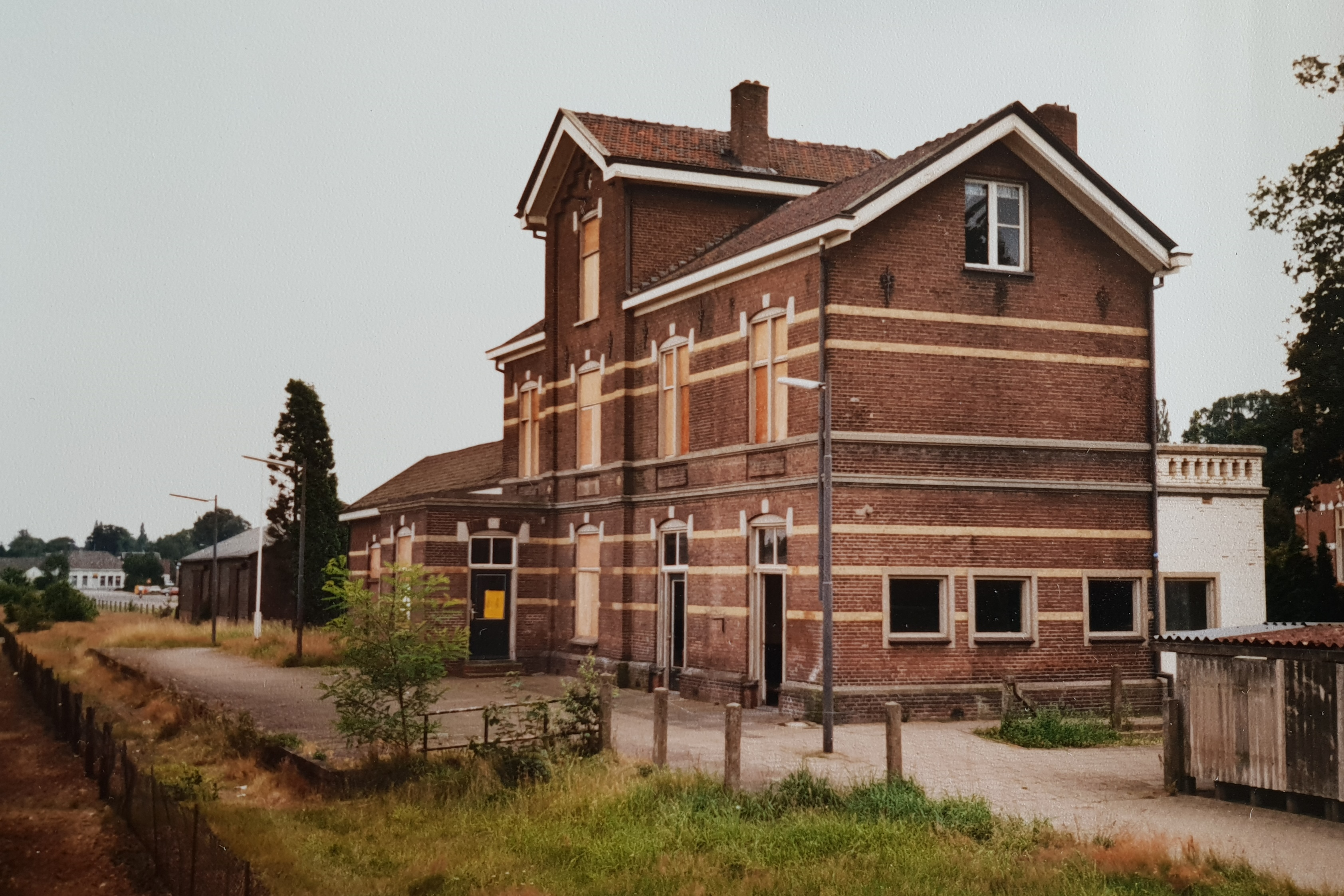 Station Terborg (foto: Daniel van der Ree, 2 augustus 1988)